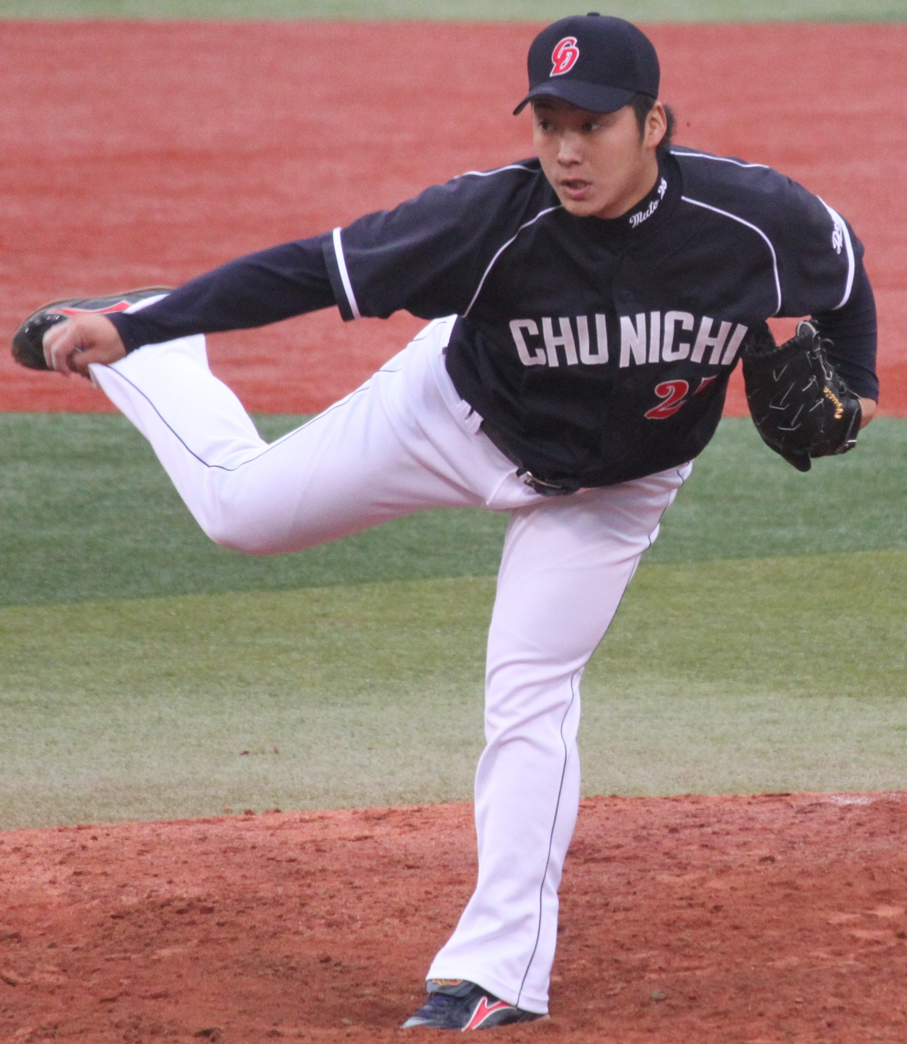 中日ドラゴンズ投手の武藤祐太。横浜スタジアムにて。